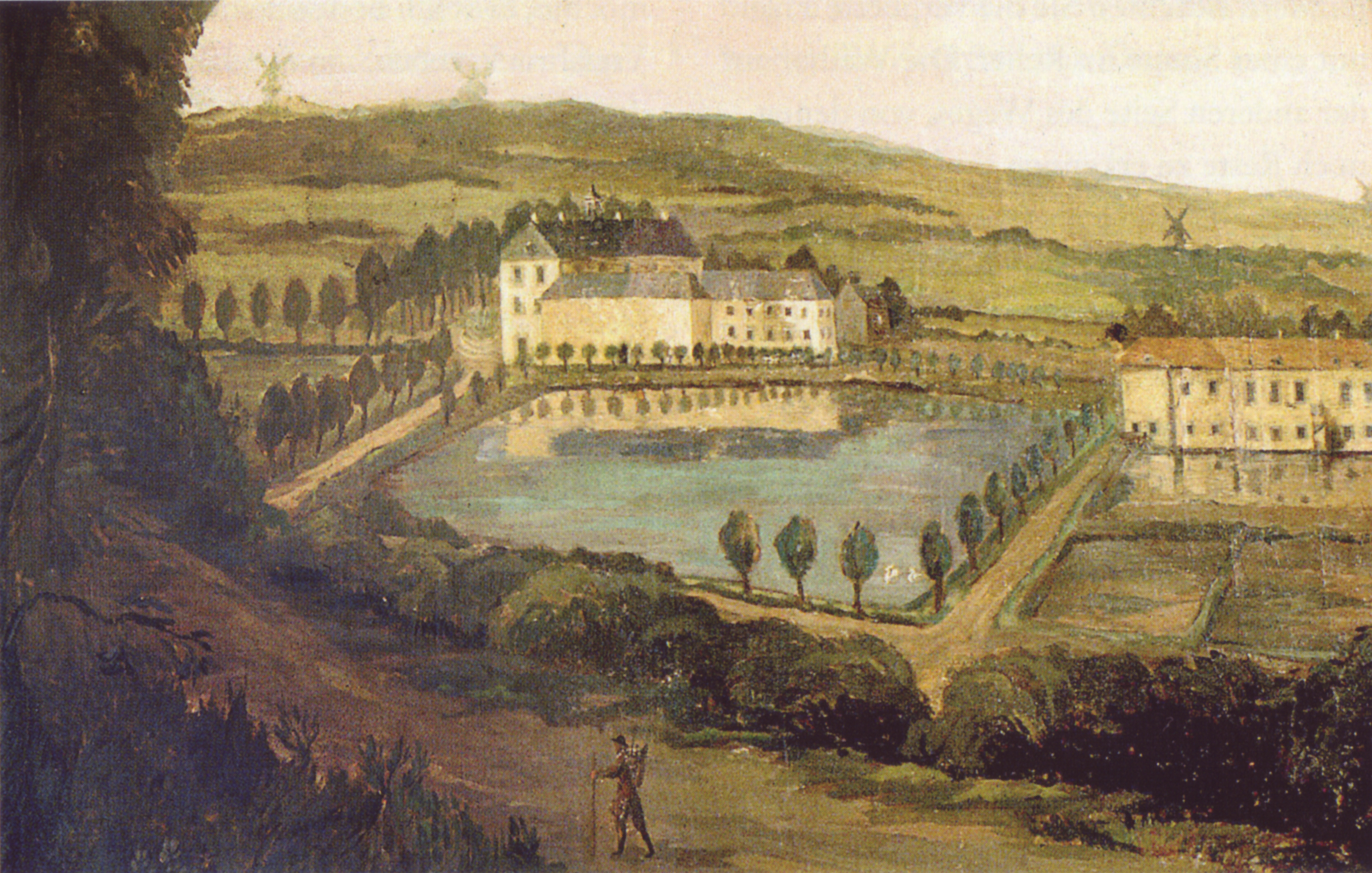 Darstellung des Schlosses und der Mühle Vaalsbroek auf einer Tapete des 18. Jahrhunderts im Gartenzimmer des Schlosses Vaalsbroek